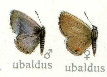 A ubaldus